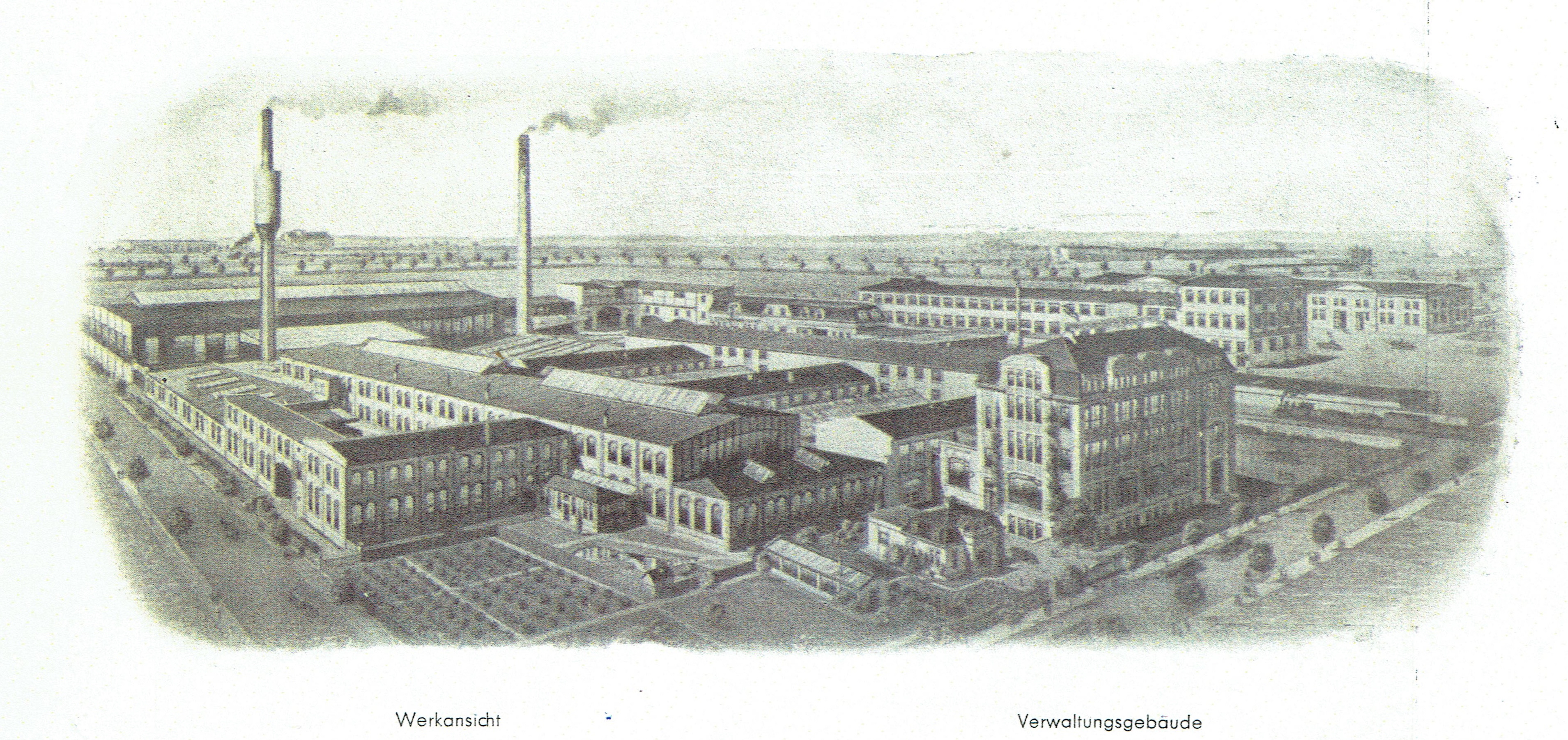 Maschinenbaufabrik in der Freienwalder Str. 17-19 als Vogelschau